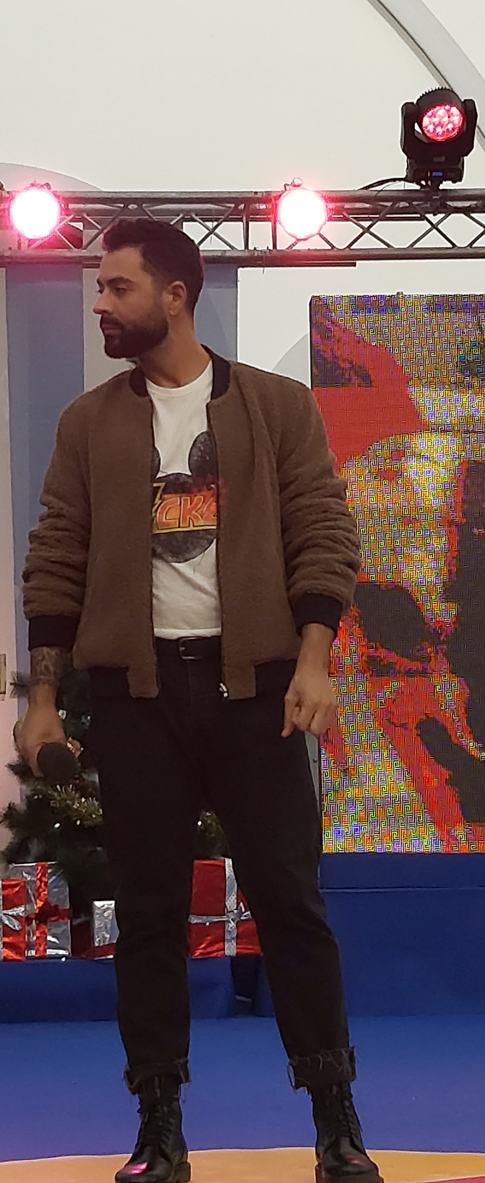 Javi Mota